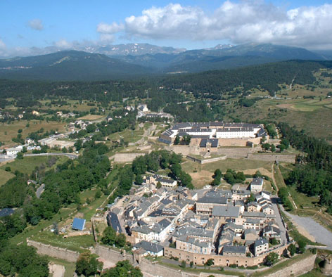 Mont-Louis place forte Vauban